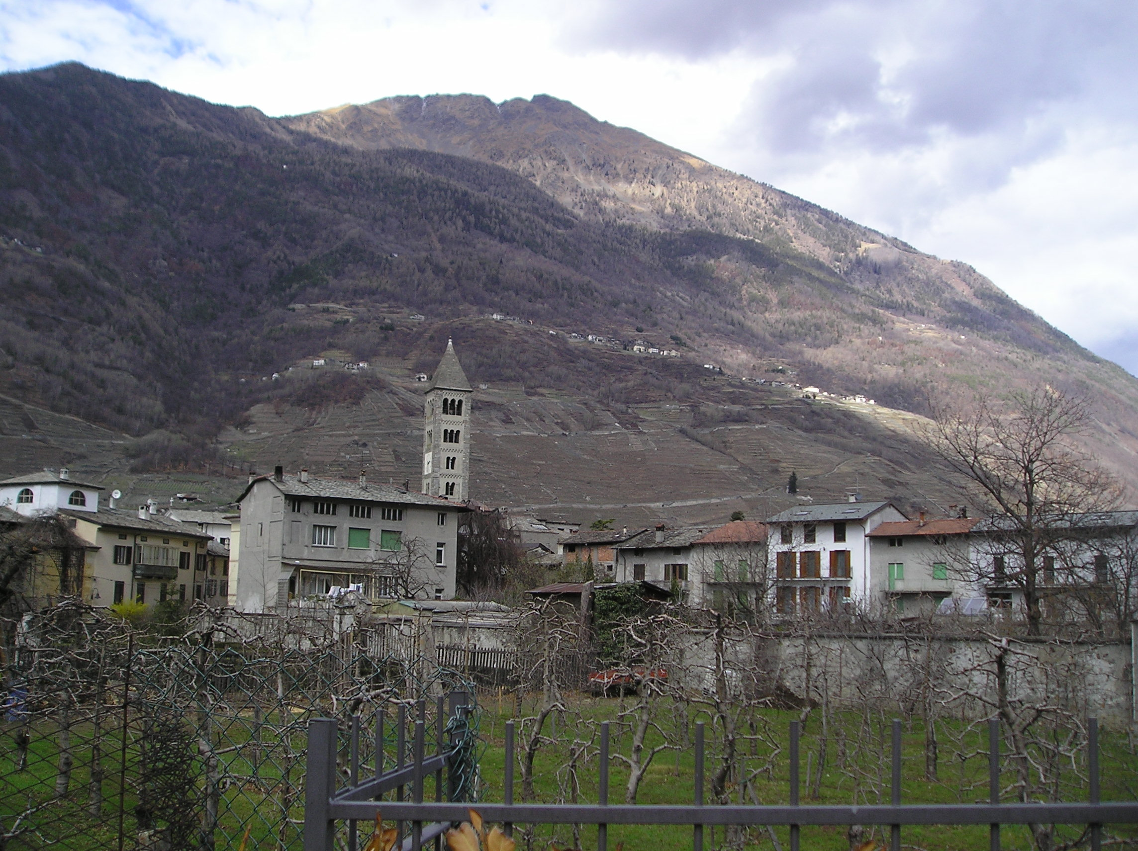 Questa foto rappresenta il centro storico di Tirano, è stata scattata da me, G. Salluzzi nel marzo 2005 ed è rilasciata in Pubblico Dominio